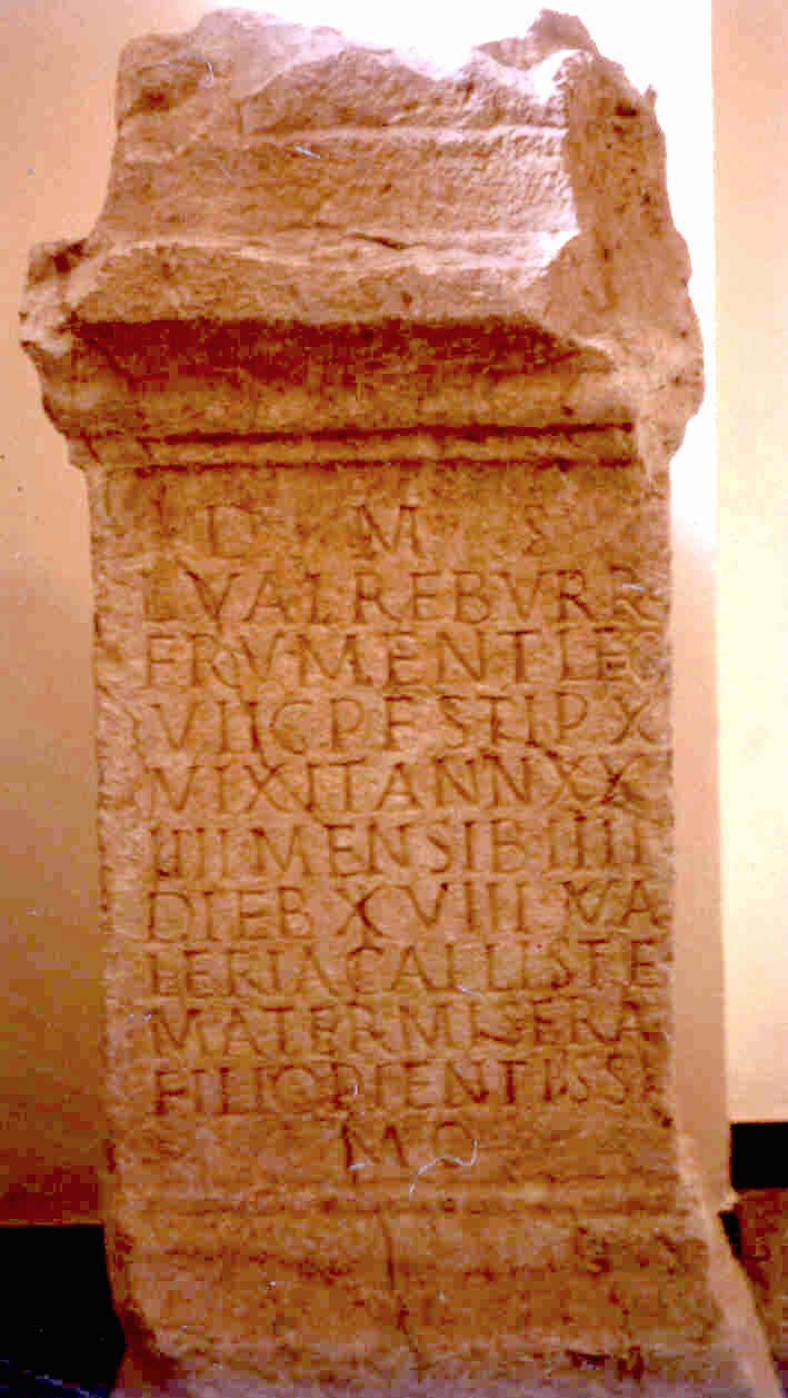 CIL II, 6088: Inscripción del legionario Valerius Reburrinus en el Museo de Arte Romano de Tarragona. D(iis)= M(anibus) S(acrum)/ L(ucius) VAL(erius) REBVRRVS/ FRVMENT(arius) LEG(ionis)/ VII G(eminae) P(ia) F(idelis) STIP(endiorum) X/ VIXIT ANN(is) XX/IIII MENSIB(us) III/ DIEB(us) XVIII VA/LERIA CALLISTE/ MATER MISERA/ FILIO PIENTISSI/MO